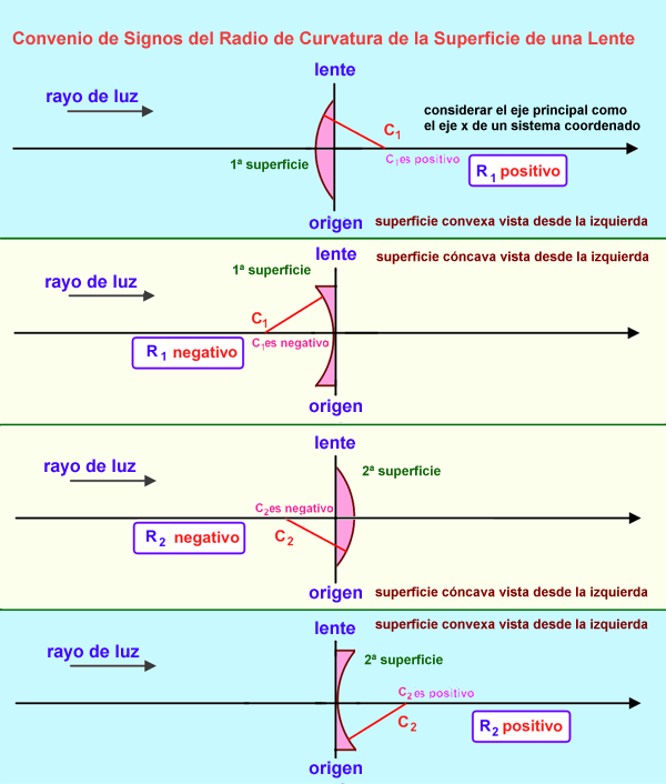 Figura ilustrando de curvaturas positivas y negativas de una lente en diseño óptico. Piénsese en el eje principal como un eje coordenado, con el origen en su centro. La luz viaja en el sentido creciente de la numeración. Si el vértice se localiza a la izquierda del centro de curvatura, el radio de curvatura es positivo. Si el vértice se localiza a la derecha del centro de curvatura, el radio de curvatura es negativo.